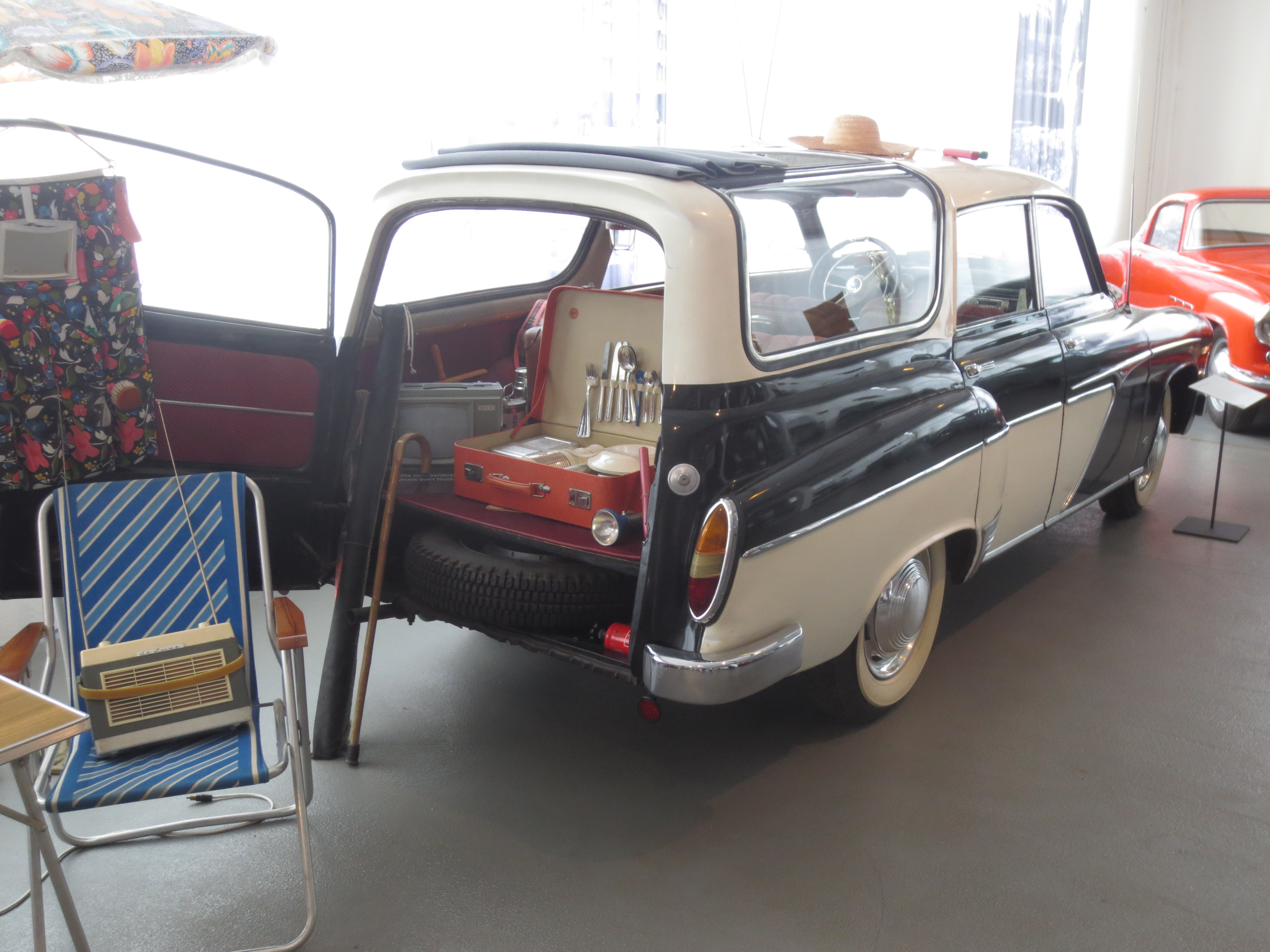 Wartburg 311 Camping-Limousine, Museum Automobilwelt Eisenach, Eisenach (Deutschland)